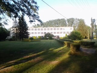 Ansicht auf das Komornoer Technikummit Schwerpunkt Landwirtschaft